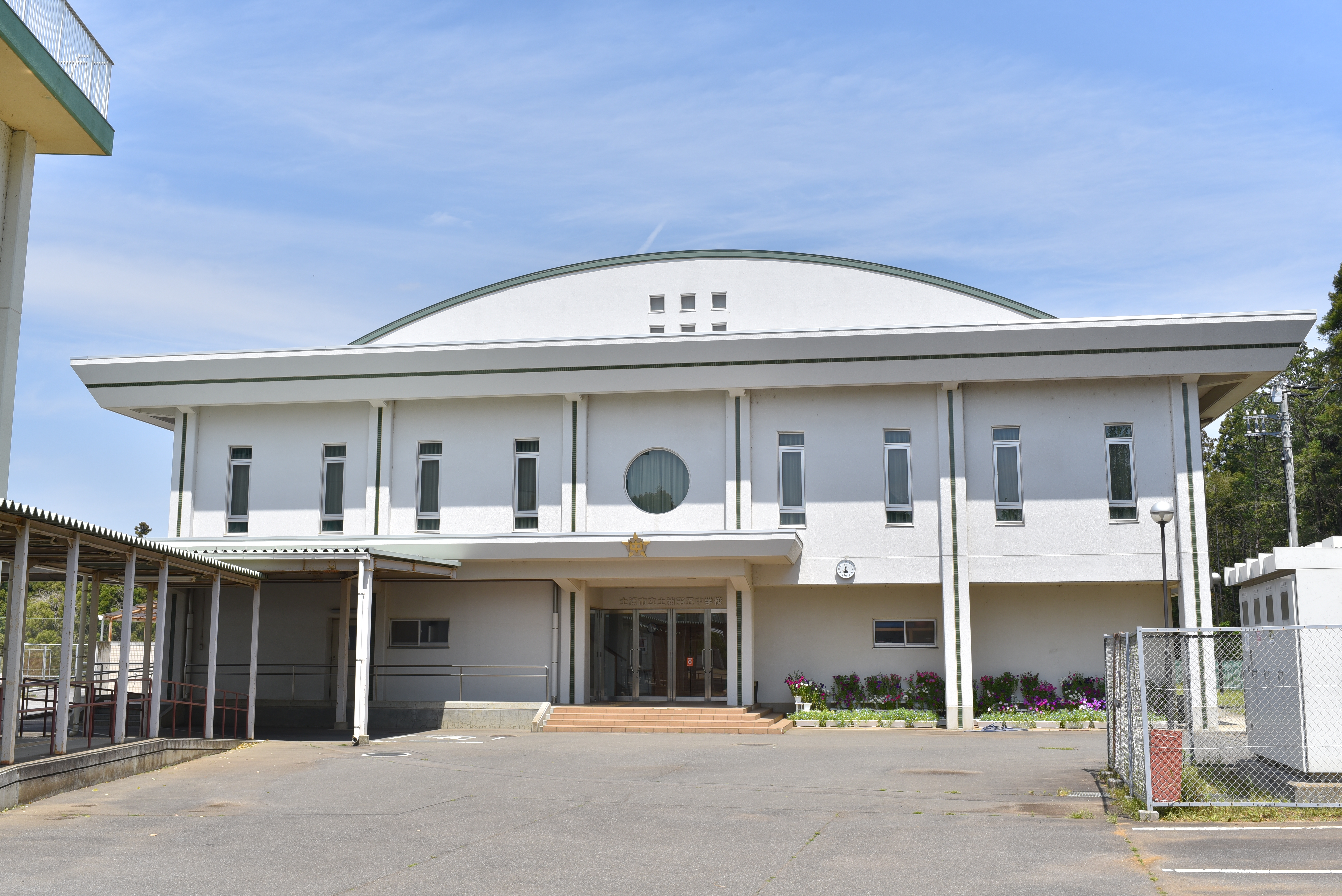 茨城県土浦市手野町に所在する、土浦市立第五中学校の体育館。